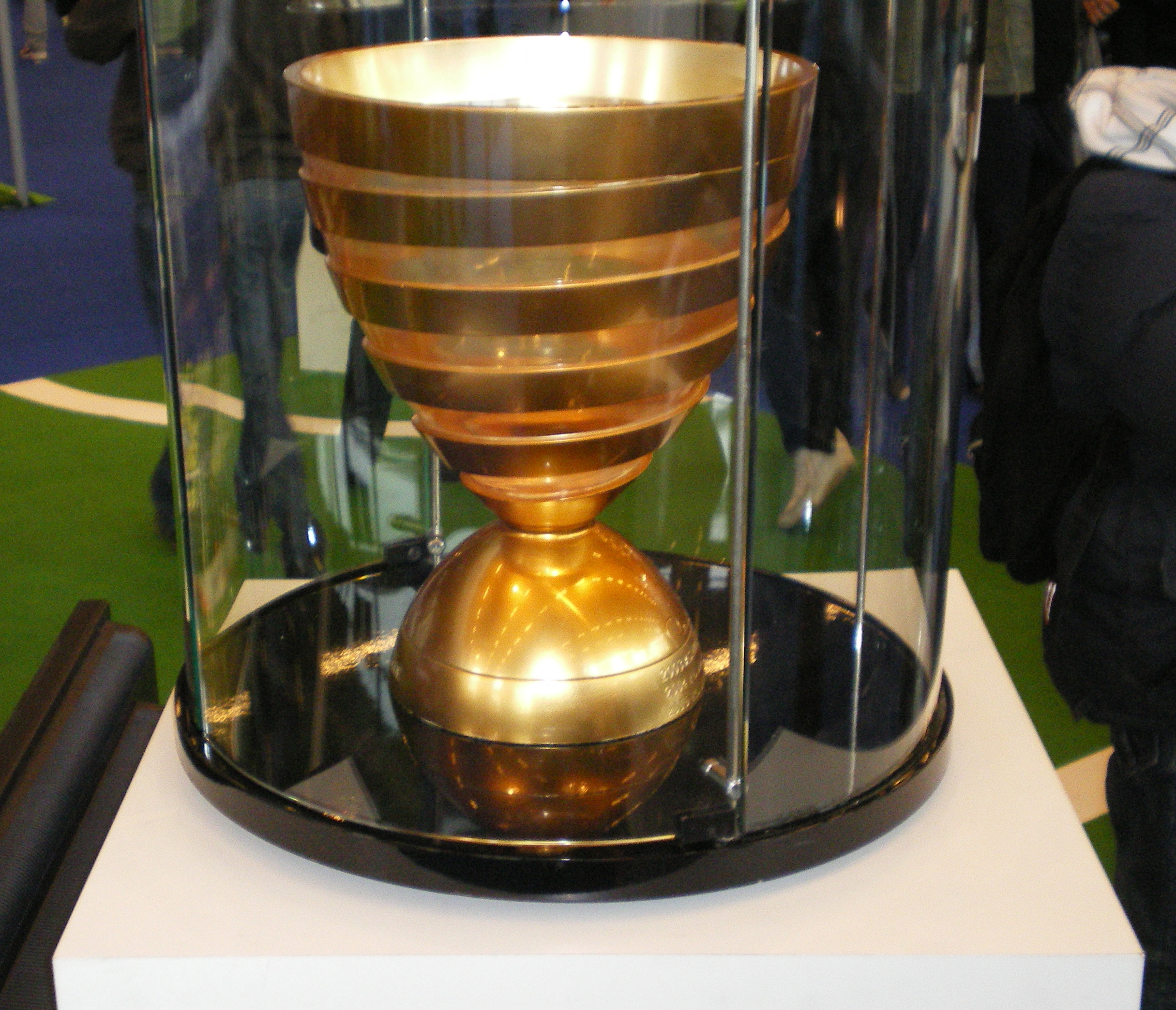 Le second trophée de la Coupe de la Ligue.